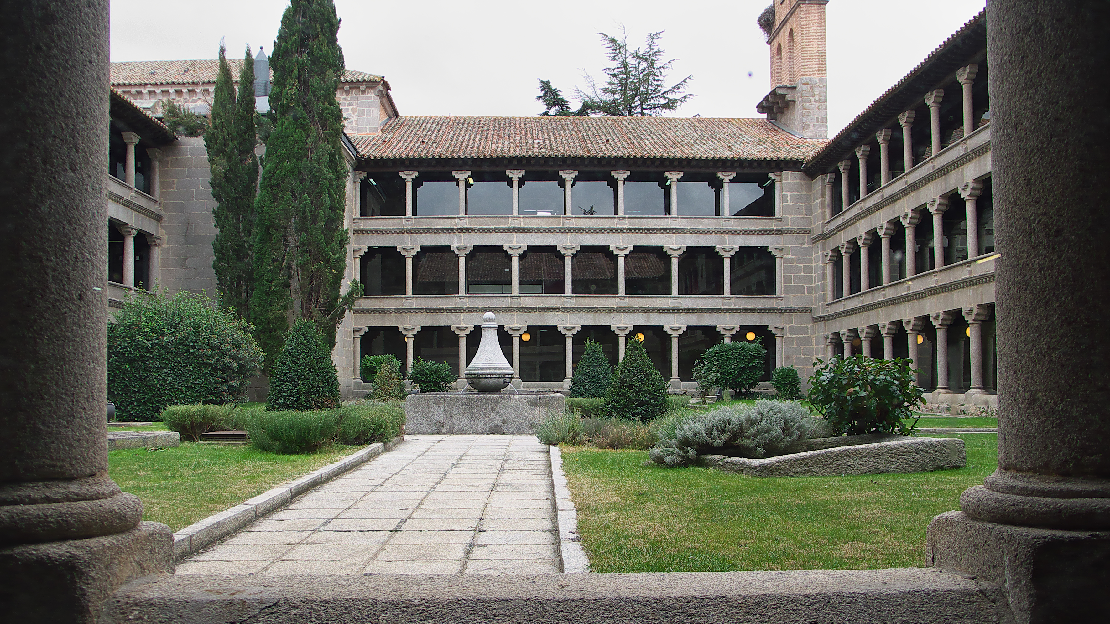 Monasterio cisterciense de los siglos XIV-XV.